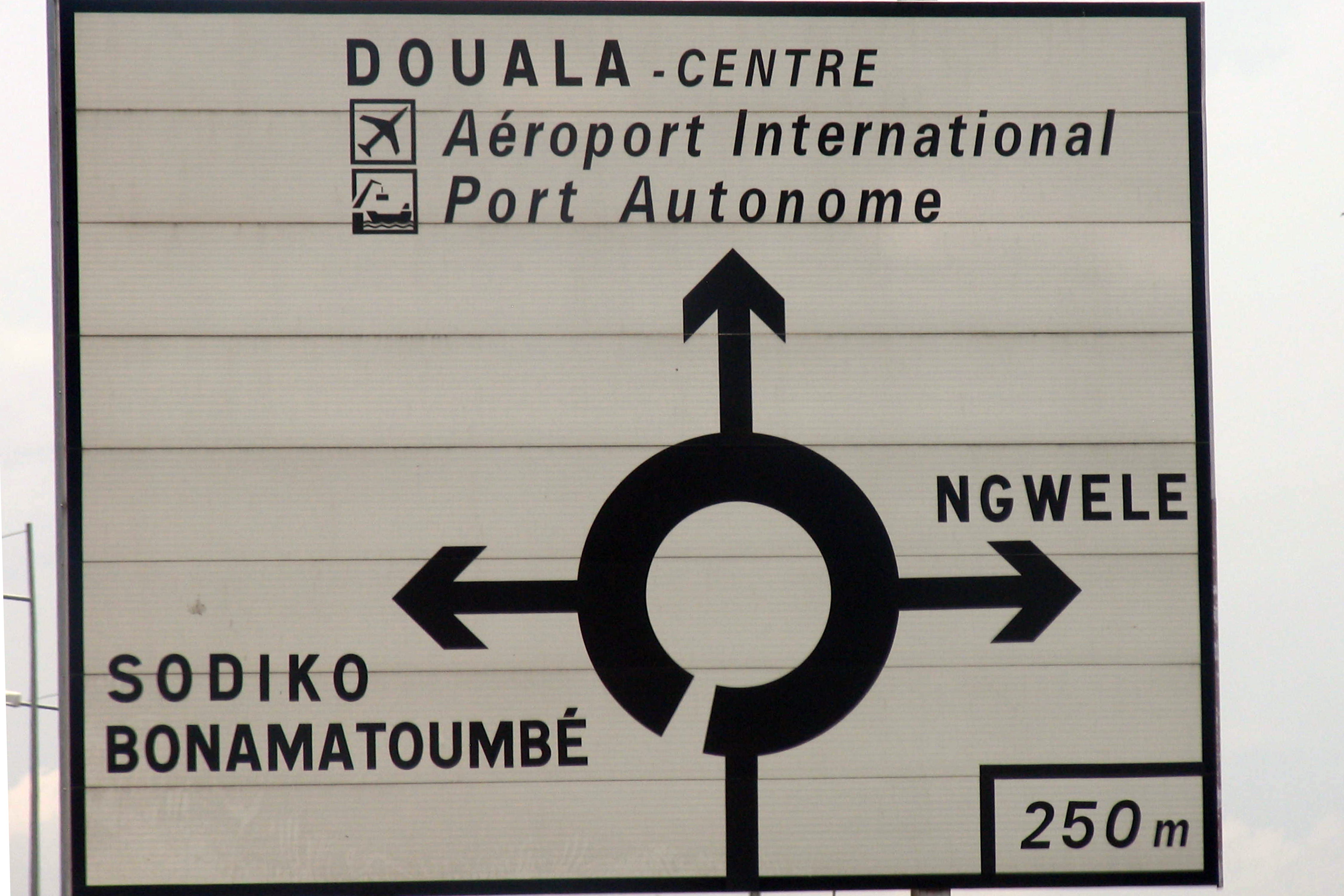 Signaux de circulation à Bonaberi près de Douala This is an image with the theme "Africa on the Move or Transport" from: Cameroon